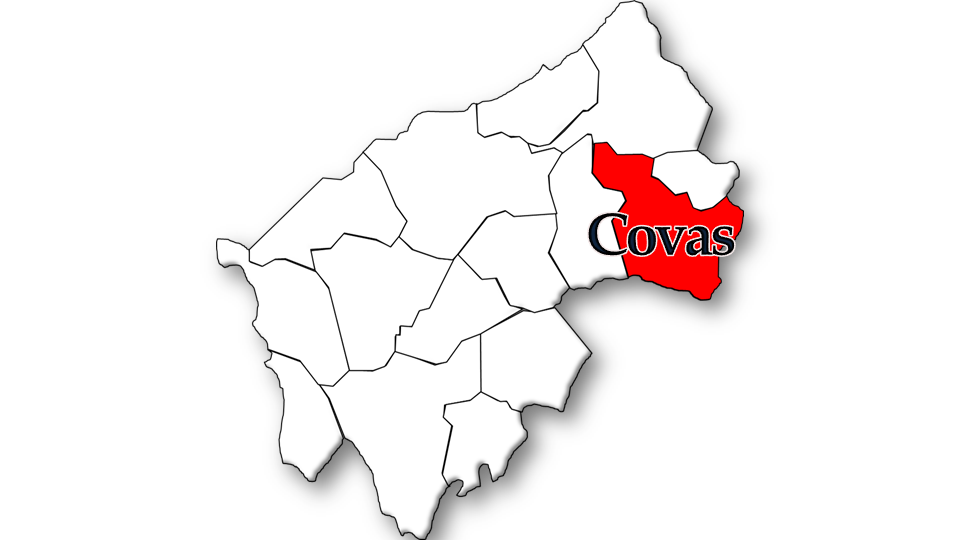 População